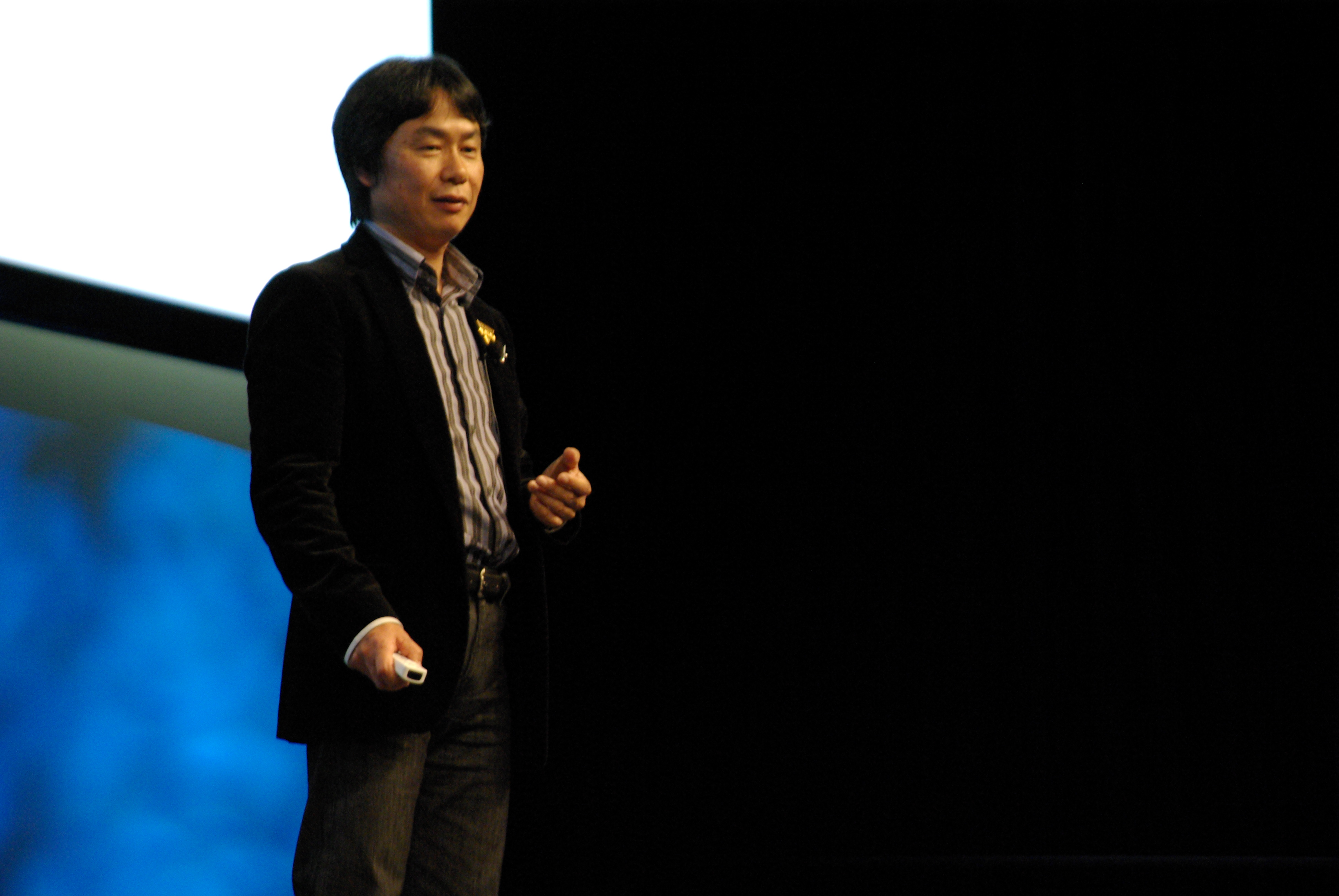 Shigeru Miyamoto at GDC 2007